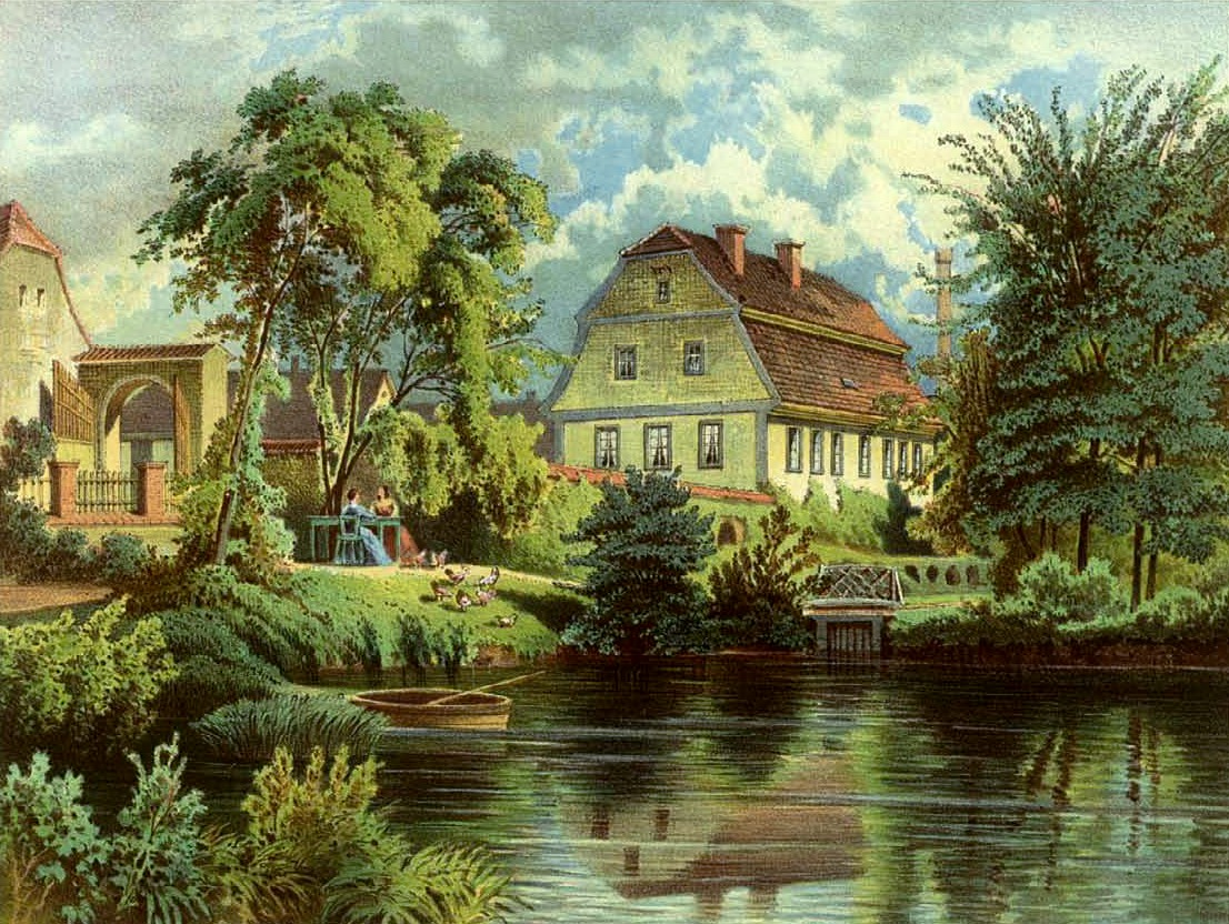 Gut Mockrehna, Lithographie von Alexander Duncker, 1869